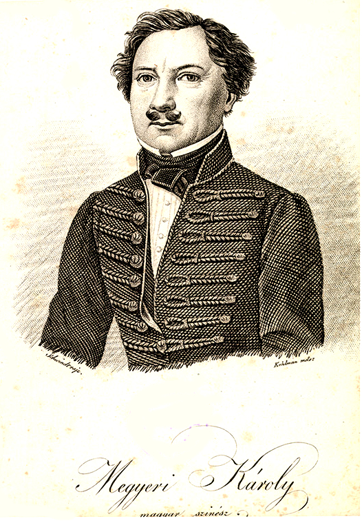 Megyeri Károly, Stand Károly (Tótmegyer, 1799. január 8. – Pest, 1842. december 12.) színész, drámaíró és -fordító.